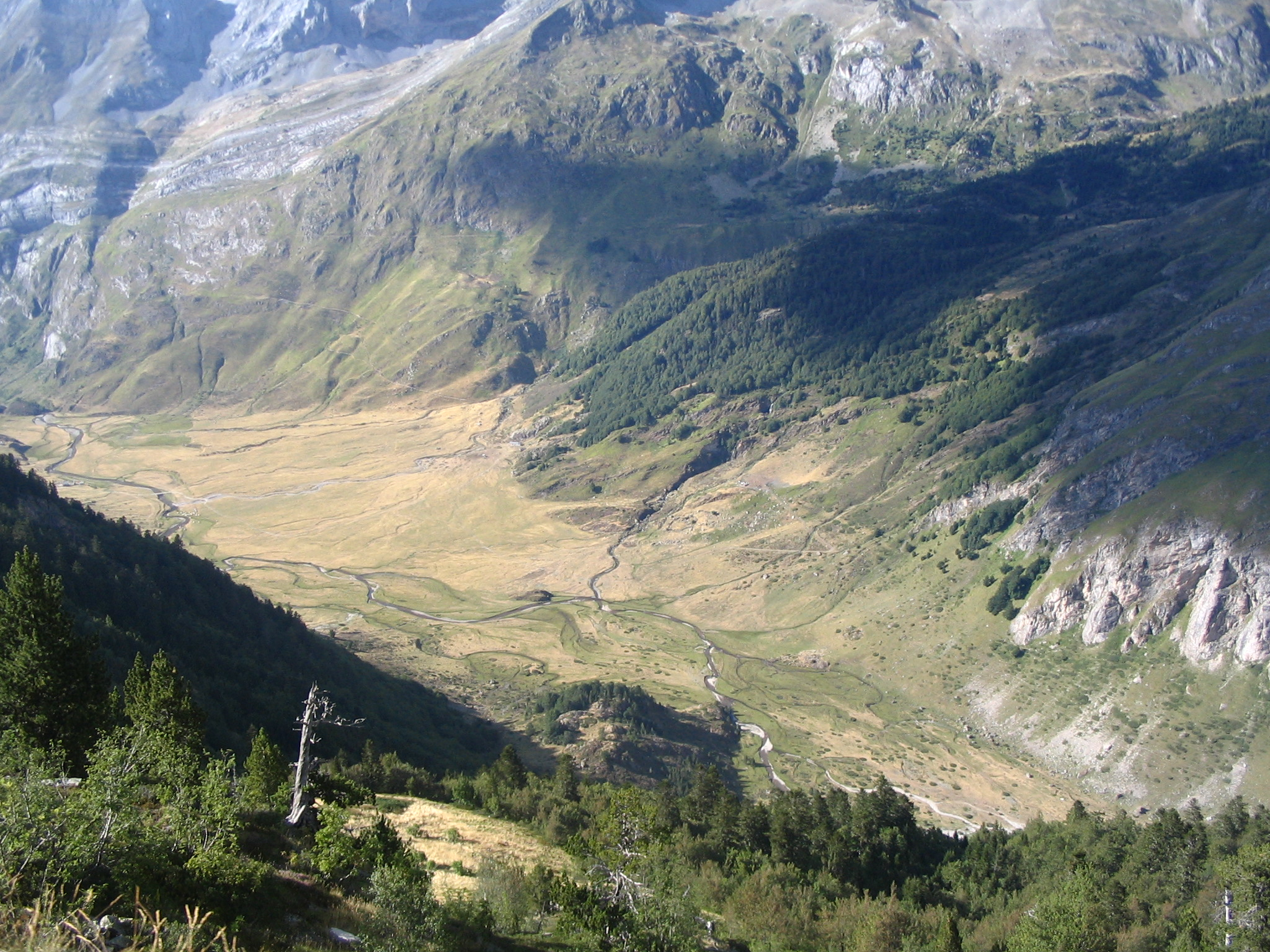 Gave de Soussouéou - Tourbières - Laruns - Pyrénées-Atlantiques - France